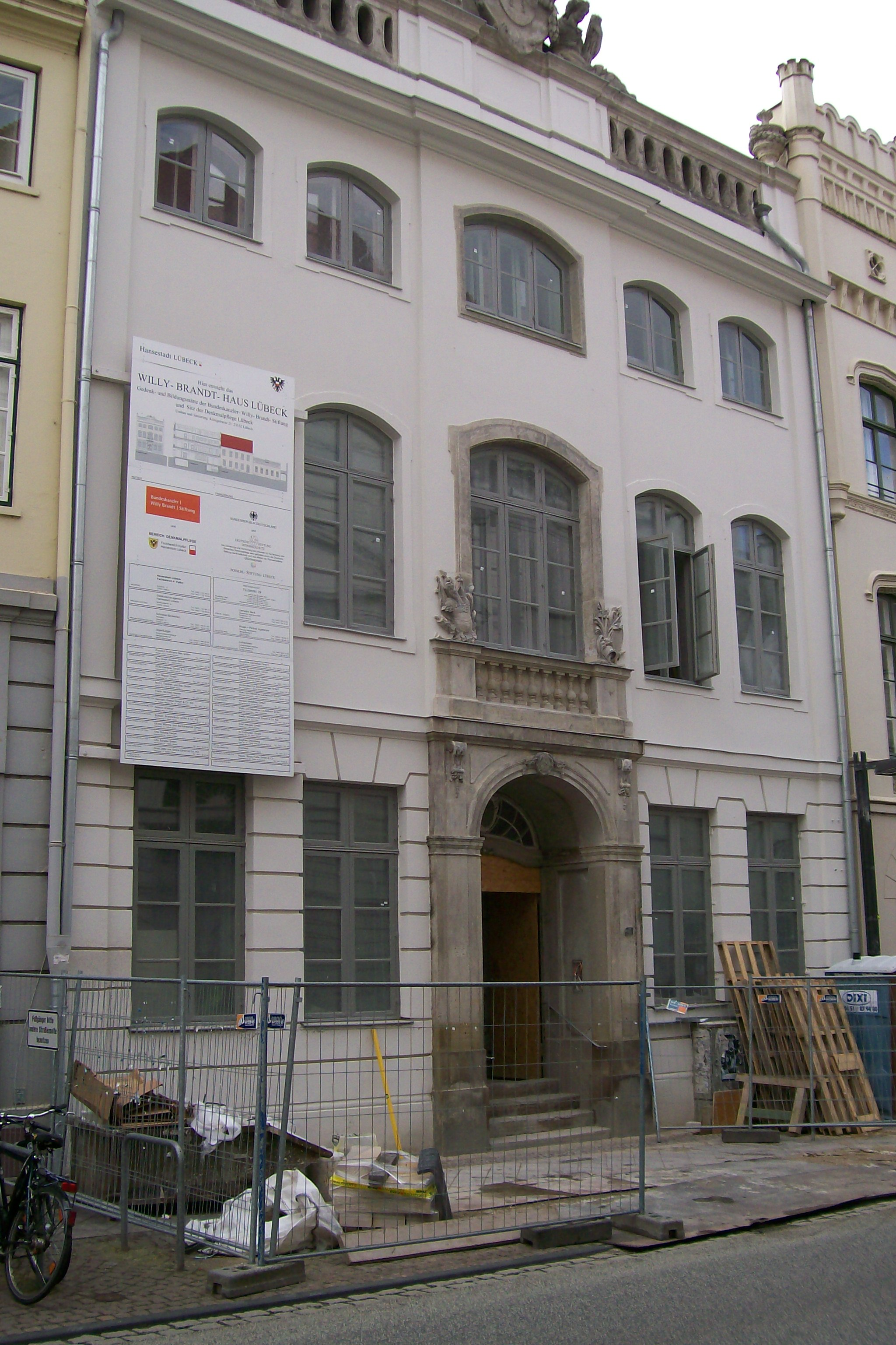 Königstraße 21 in Lübeck, former seat of Zirkelgesellschaft, since 1822 Oberappellationsgericht, later on archive of Lübeck, will be seat of Bundeskanzler-Willy-Brandt-Stiftung/foundation on 18 Dezember 2007